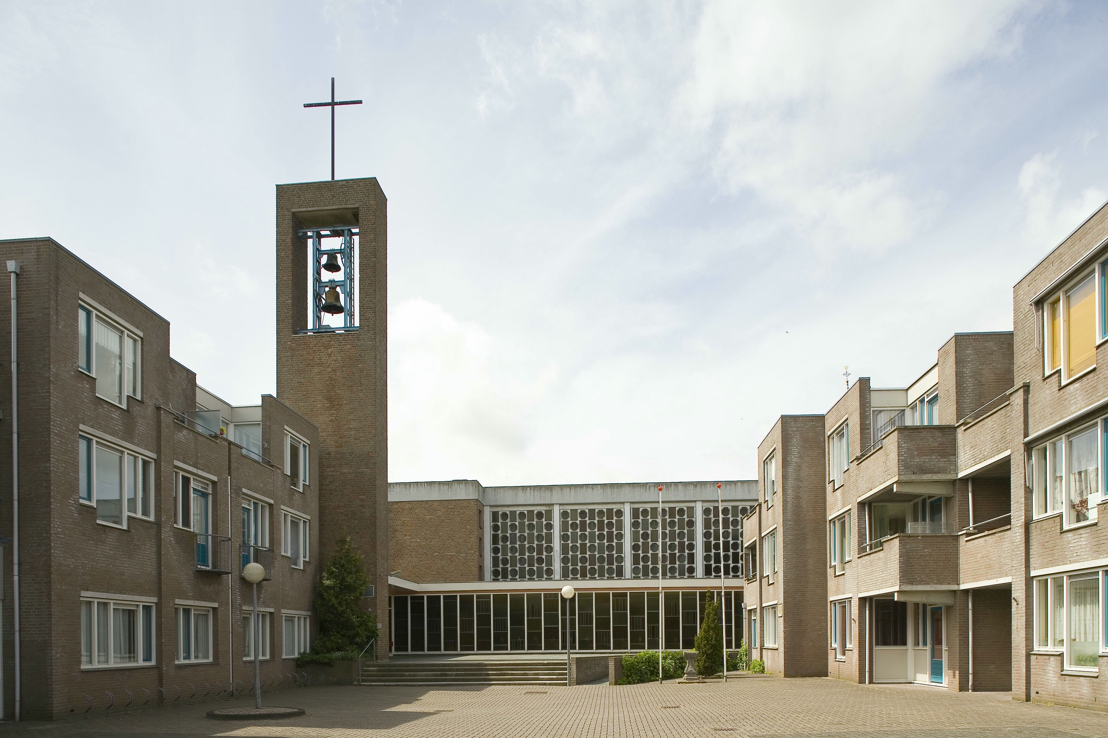 H. Franciscus van Assisië: Aanzicht vanuit het oosten